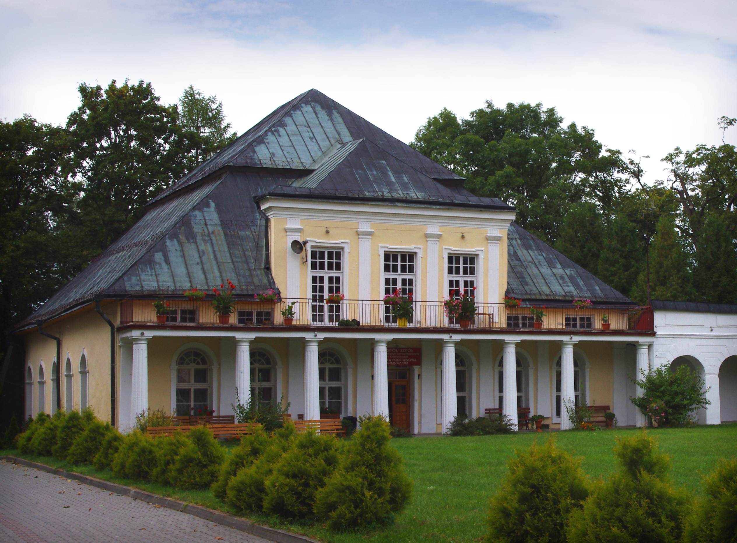 Krasnobród, Pałac Leszczyńskich.